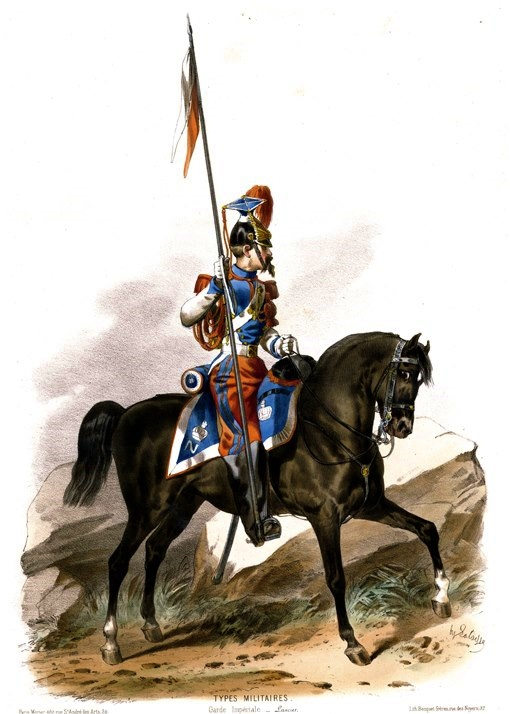 Lancier de la Garde impériale, 1855-1870. Grande tenue.